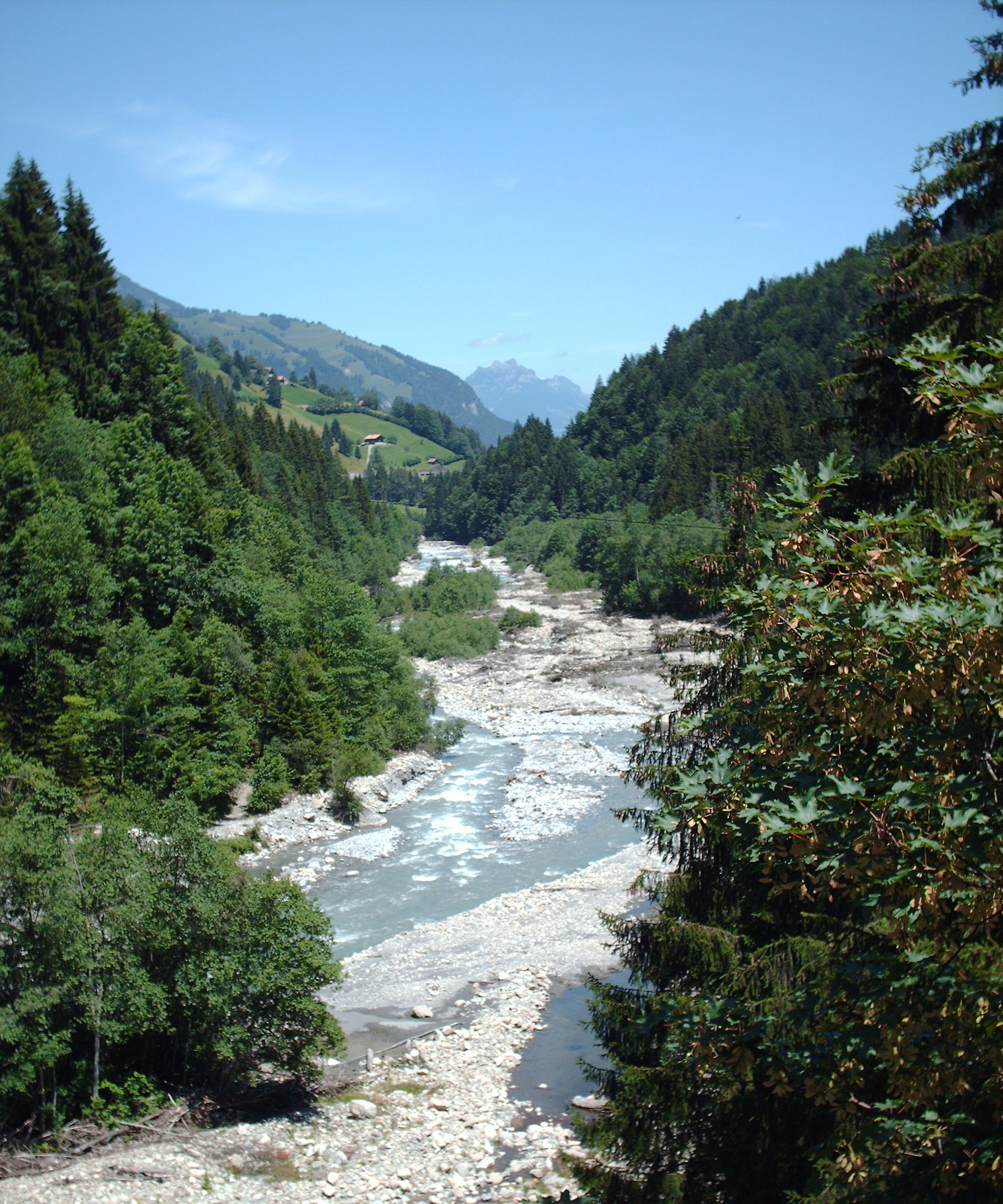 Auenlandschaft an der Engstlige ob Frutigen, Auengebiet von nationaler Bedeutung